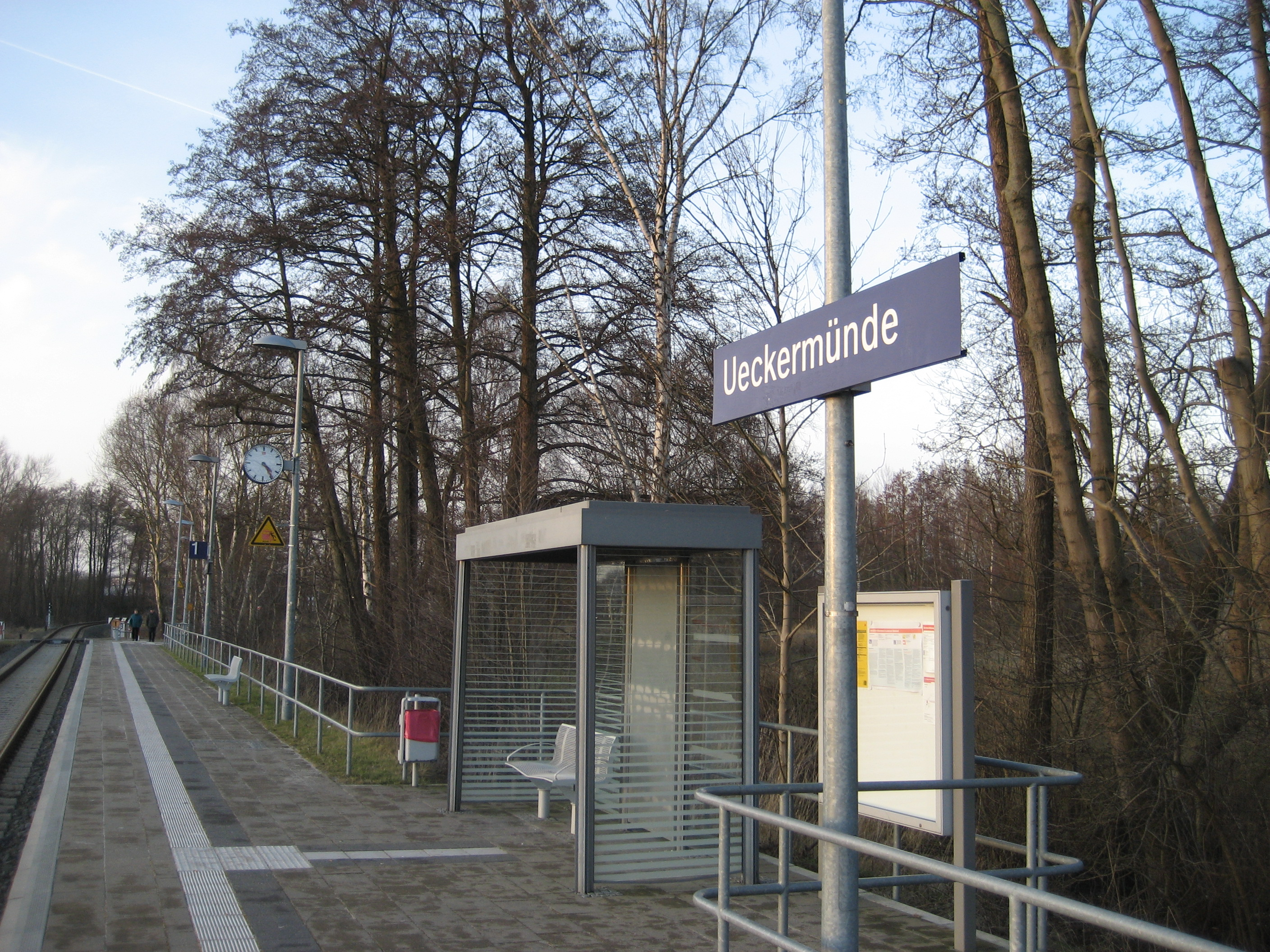 Zughaltepunkt Ueckermünde, ca. 700 Meter nördlich des Alten Bahnhofes Ueckermünde.